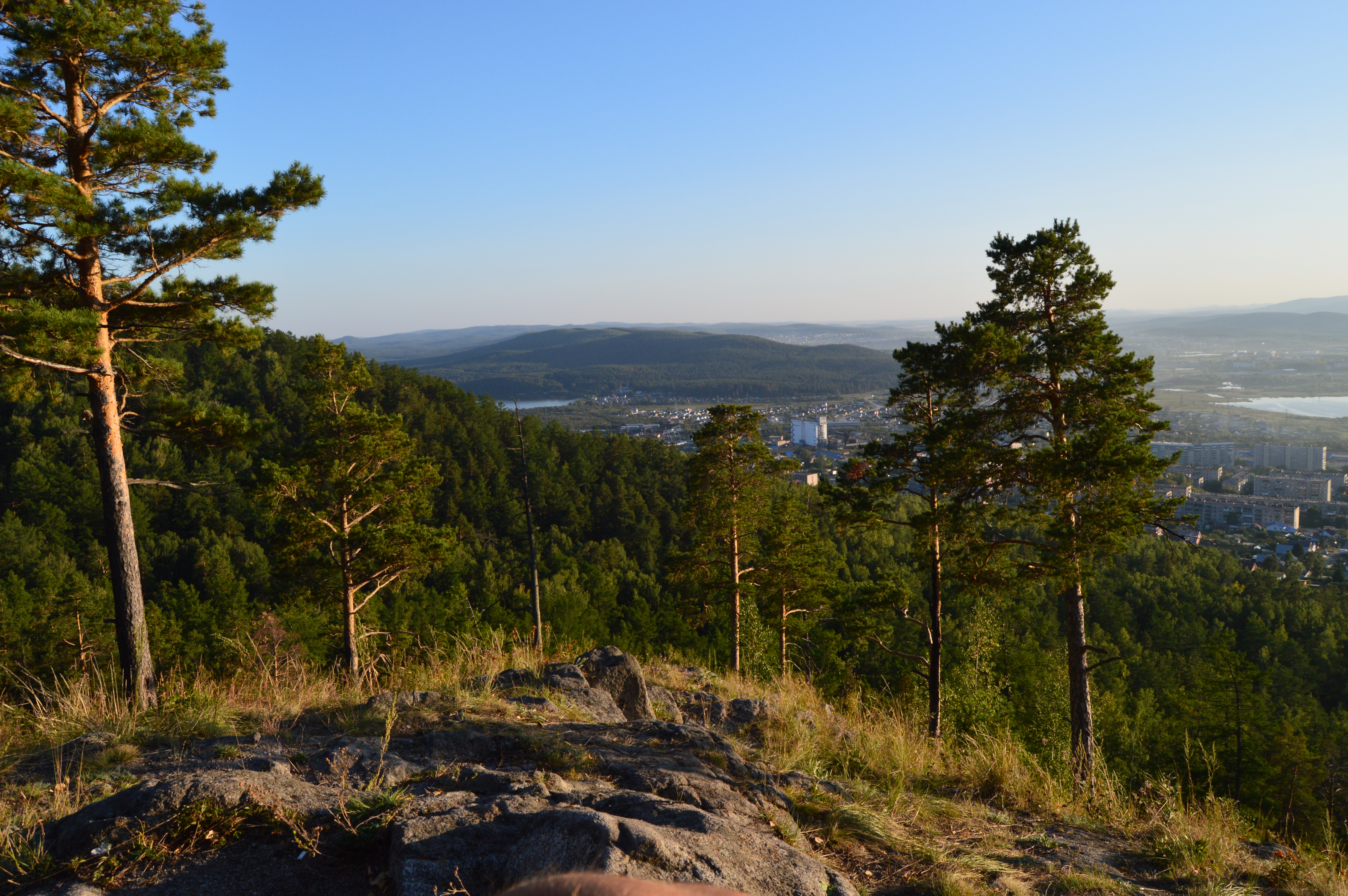 Ильменский государственный заповедник: в восточных предгорьях Южного Урала на Ильменском хребте, к северо-востоку от г. Миасс. Большая часть расположена на территории, административно подчиненной г. Миасс, остальная врезается в соседние районы - Чебаркульский и Аргаяшский, заканчиваясь вблизи с. Ново-Андреевка, в 20 км от г. Карабаш, Миасс-1, Миасский городской округ, Челябинская область This image is related to the protected area of Russia number 7400204